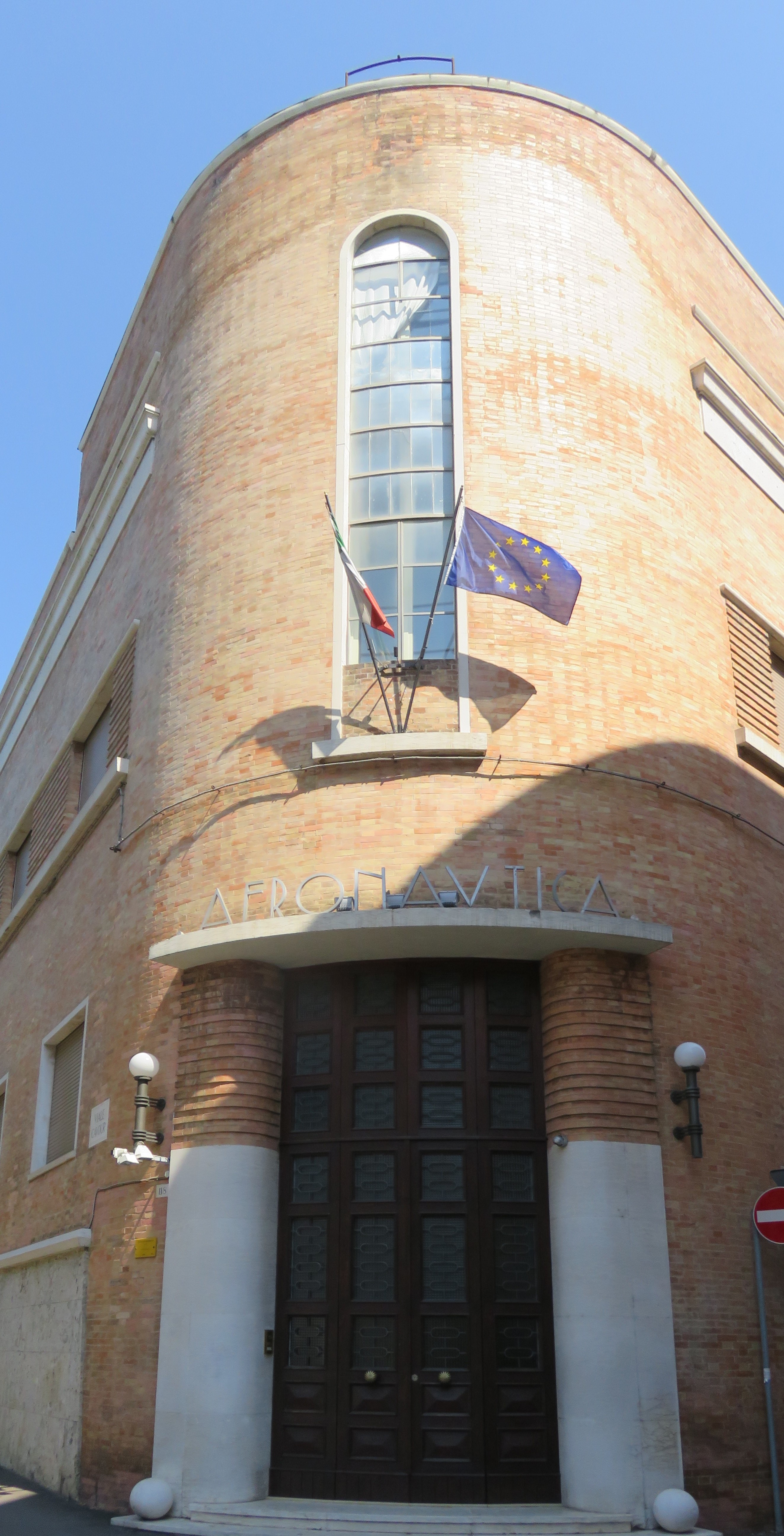 Palazzo dell'Aeronautica - Ferrara